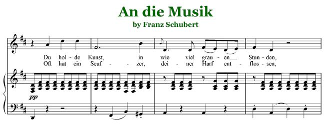 Excerpt of Schubert's "An die Musik"